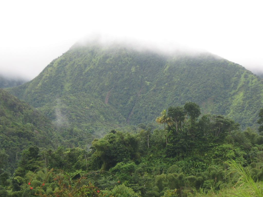 Les pitons du Carbet dans la brume vus du jardin botanique de Balata (Martinique)